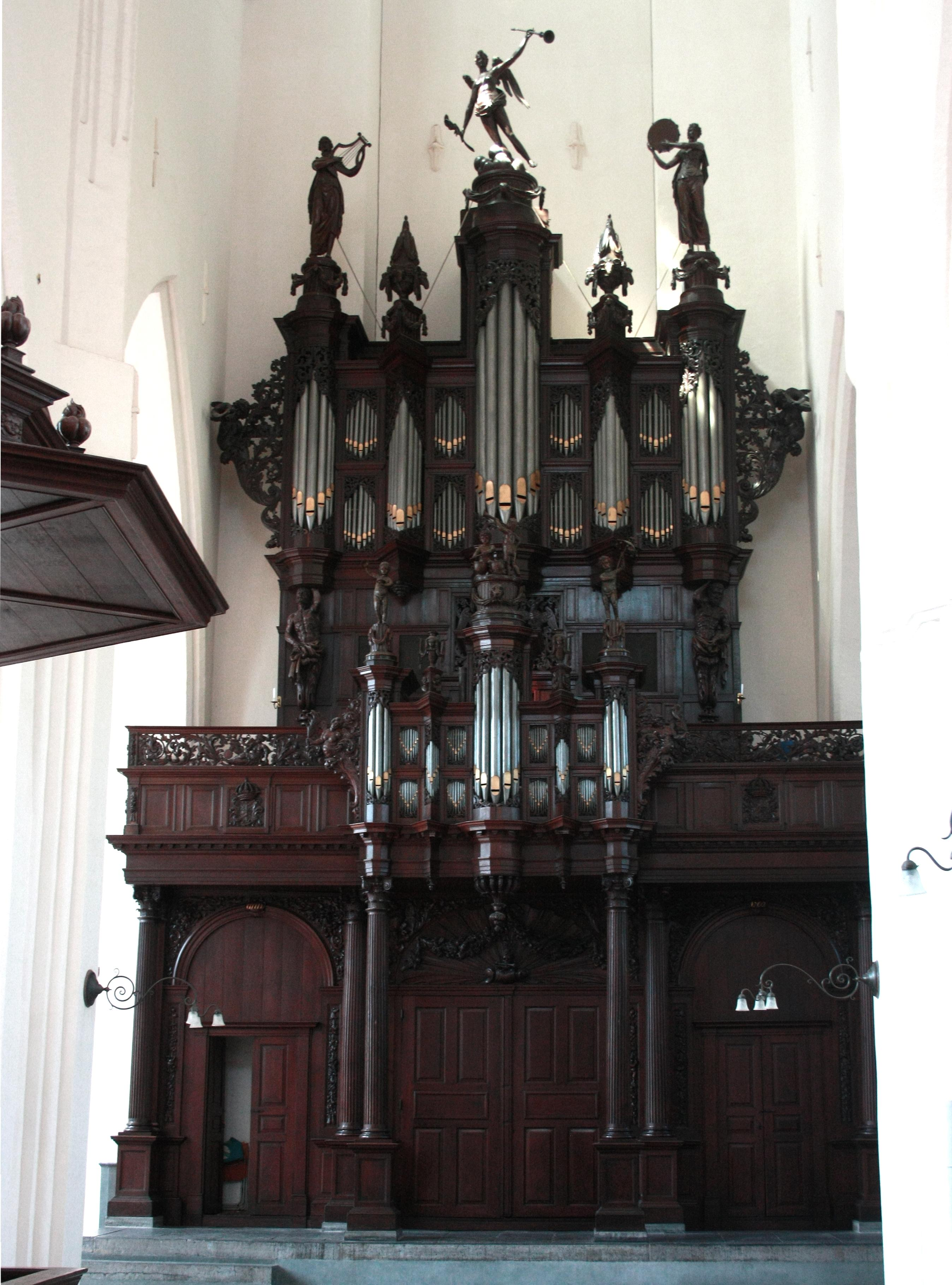 Orgel in Groningen, Der Aa-kerk, Niederlande